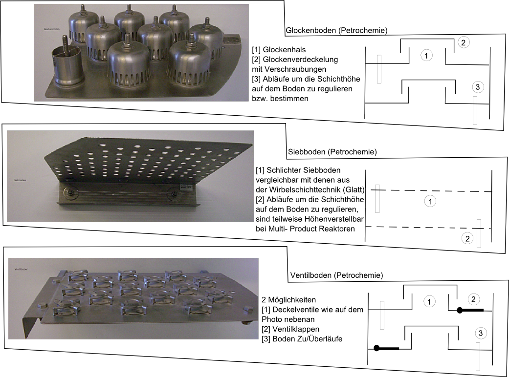 Photografische und schematische Darstellung von Glocken-, Sieb- und Ventilaustauschböden für industrielle Rektifikationsanlagen